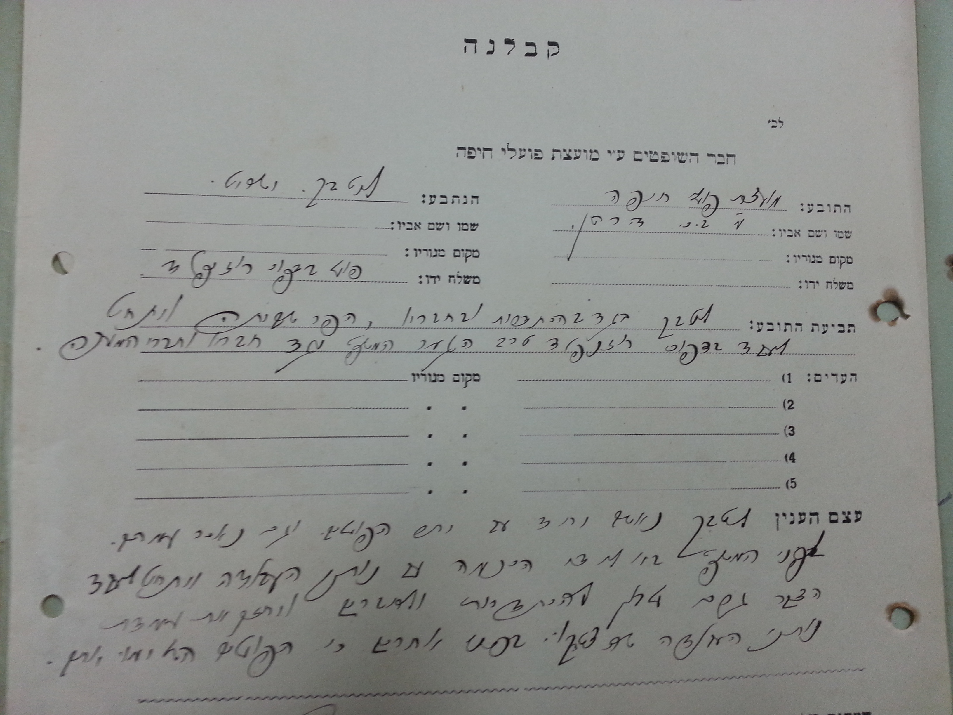 מסמך משפטי אודות משפט חברים של ההסתדרות הכללית שהתקיים בשנת 1923